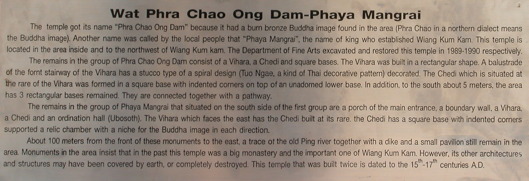 Info over de tempels Wat Phrachao Ong Dam en Wat Phaya Mangrai die ter plekke beschikbaar is. 2-talig: Thais en Engels.